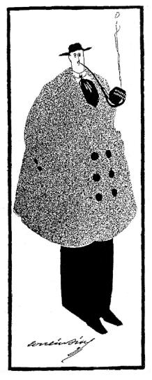 Auto-caricatura do artista plástico português Fernando Correia Dias (1892-1935)